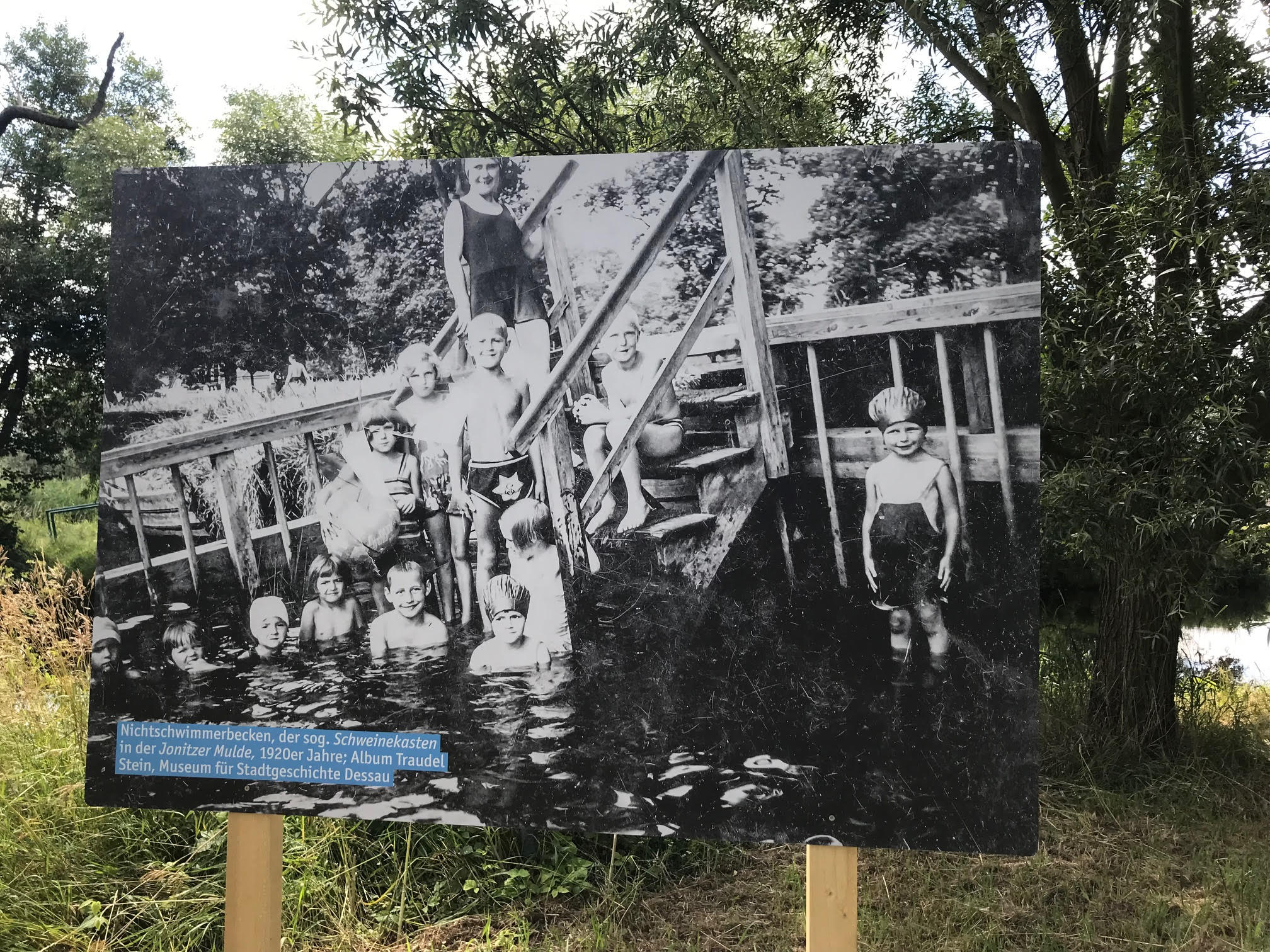 Foto einer Ausstellungstafel, die ein historisches Bild mit Kindern im sog. Schweinekasten zeigt. Vor Ort im Flussbad Rehsumpf, Dessau.